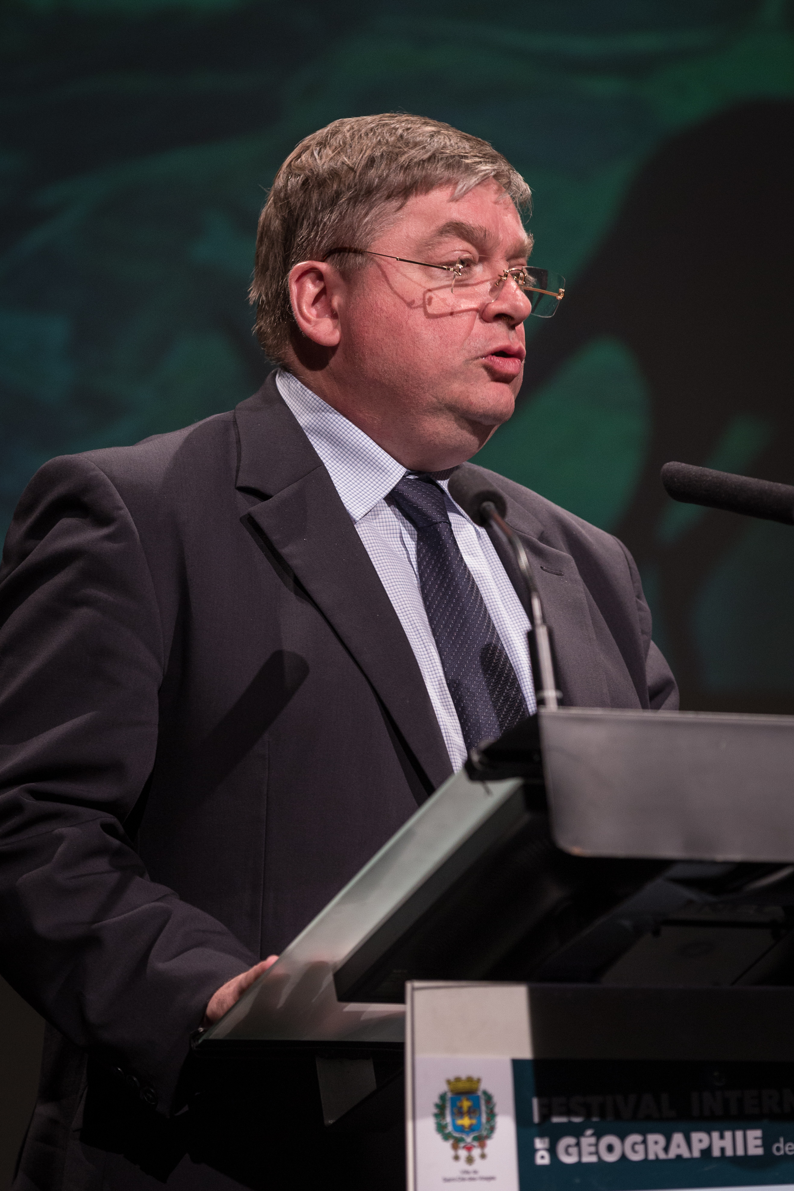 François Vannson, président du conseil départemental des Vosges, lors de la cérémonie d'ouverture du Festival international de géographie 2015.